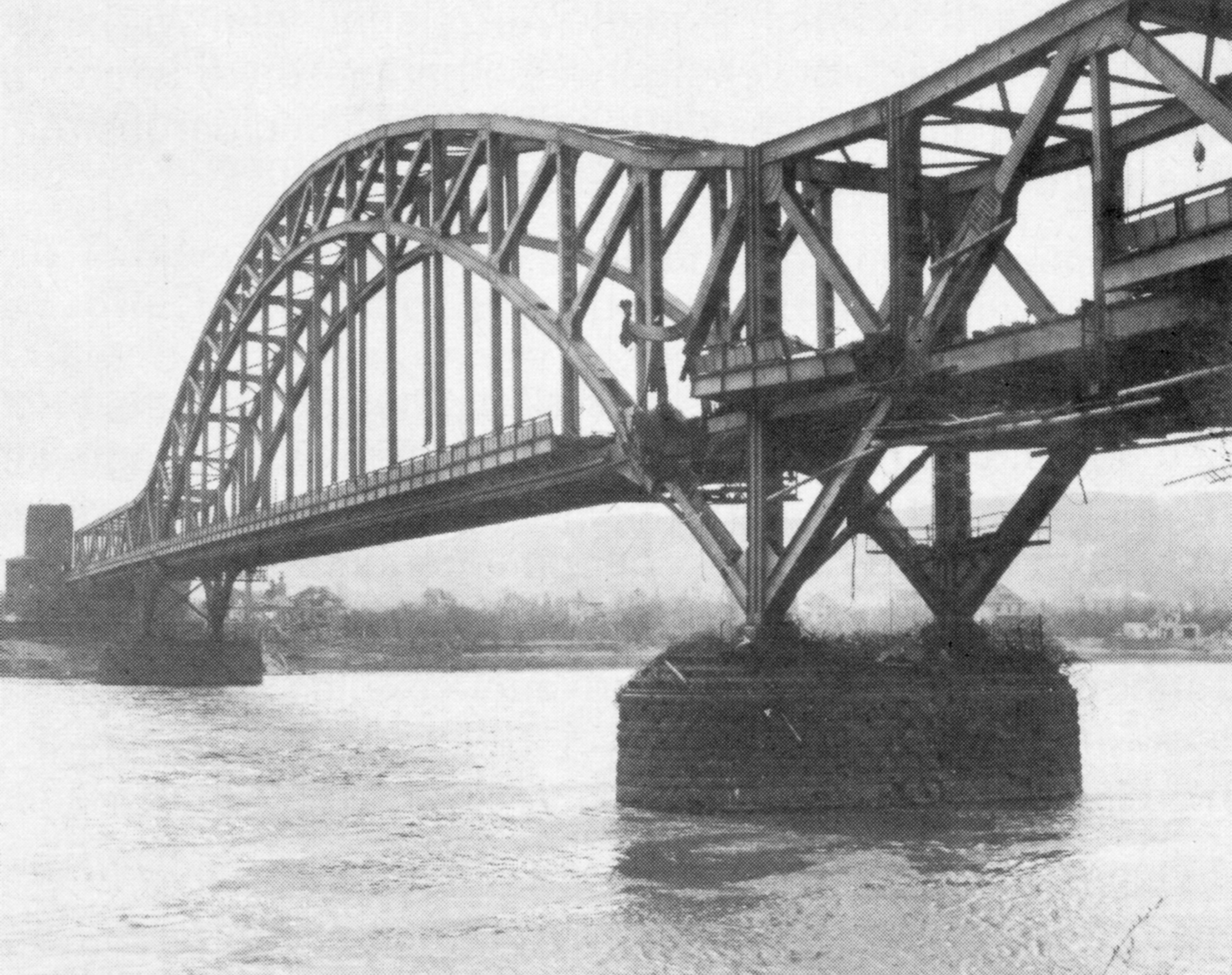 Die Ludendorff-Brücke nach der Eroberung im März 1945. Das Bild zeigt erhebliche strukturelle Schäden im Bereich des nördlichen Strompfeilers. Hier lag auch der zentrale Sprengpunkt.